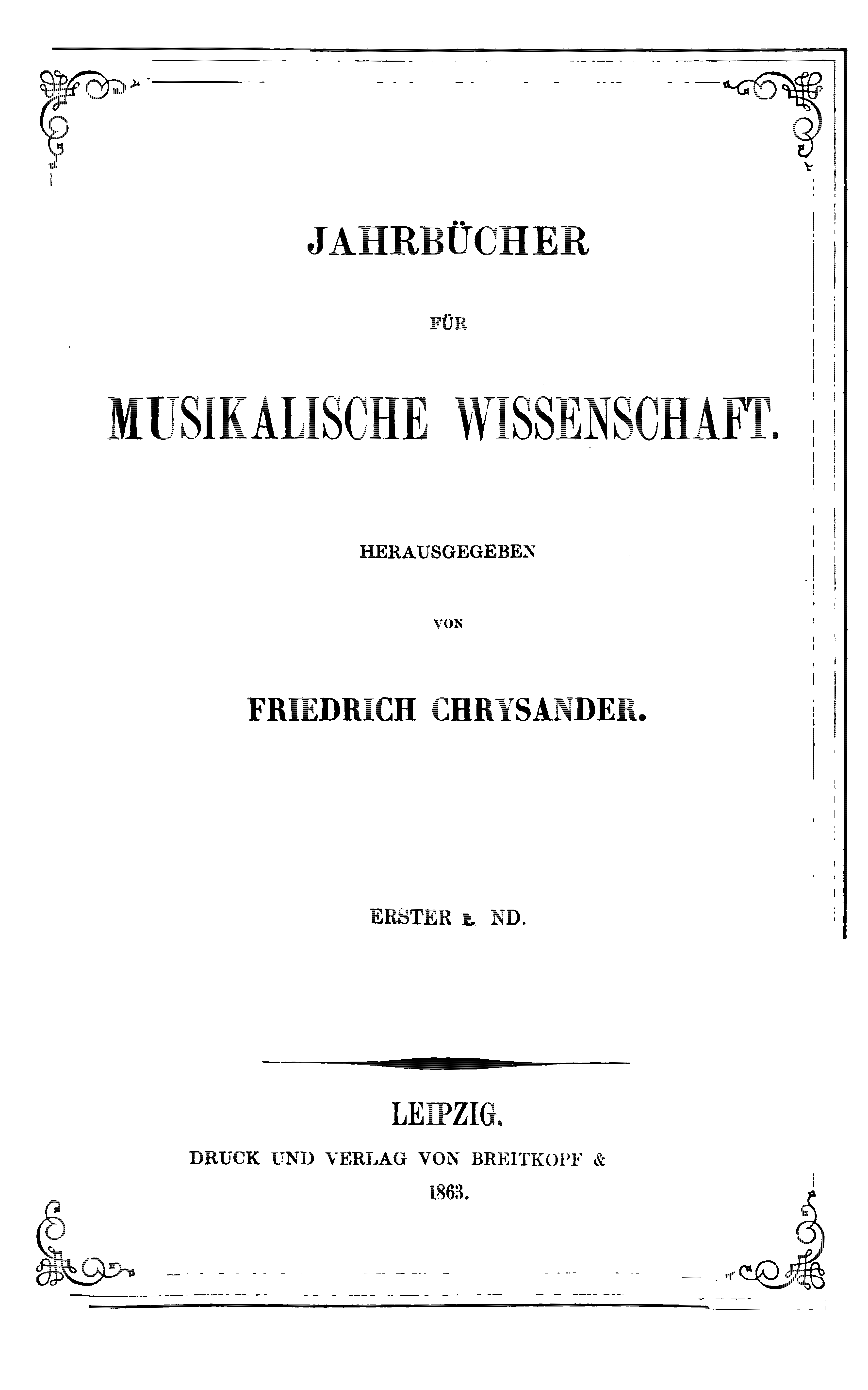 Titelseite der Zeitschrift / Title page of the periodical